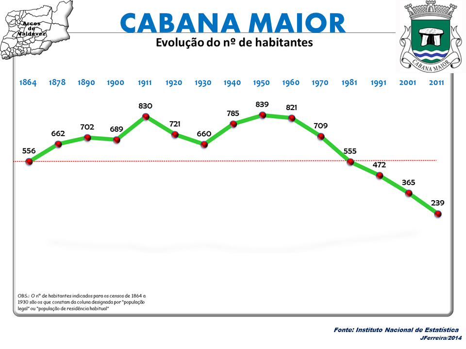 Censoa 1864/2011